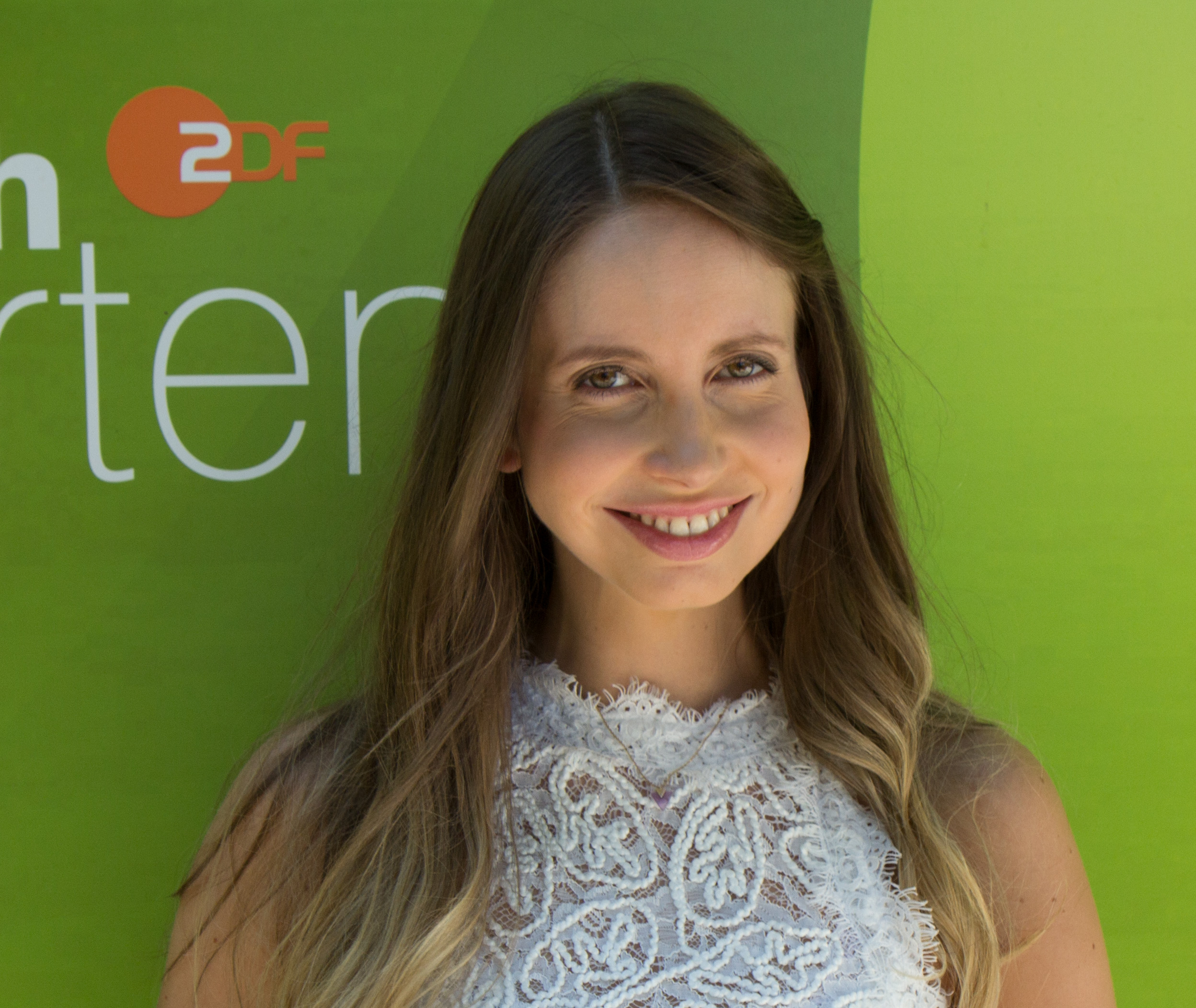 Christiane Stenger als Gast im ZDF-Fernsehgarten am 19. August 2018 in Mainz.